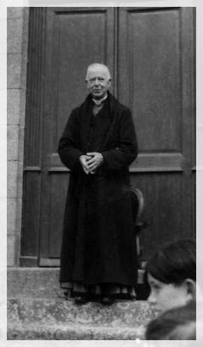 Mgr Serrand, évêque de Saint-Brieuc et Tréguier, vient à Saint-Ilan présider la Fête-Dieu de 1946